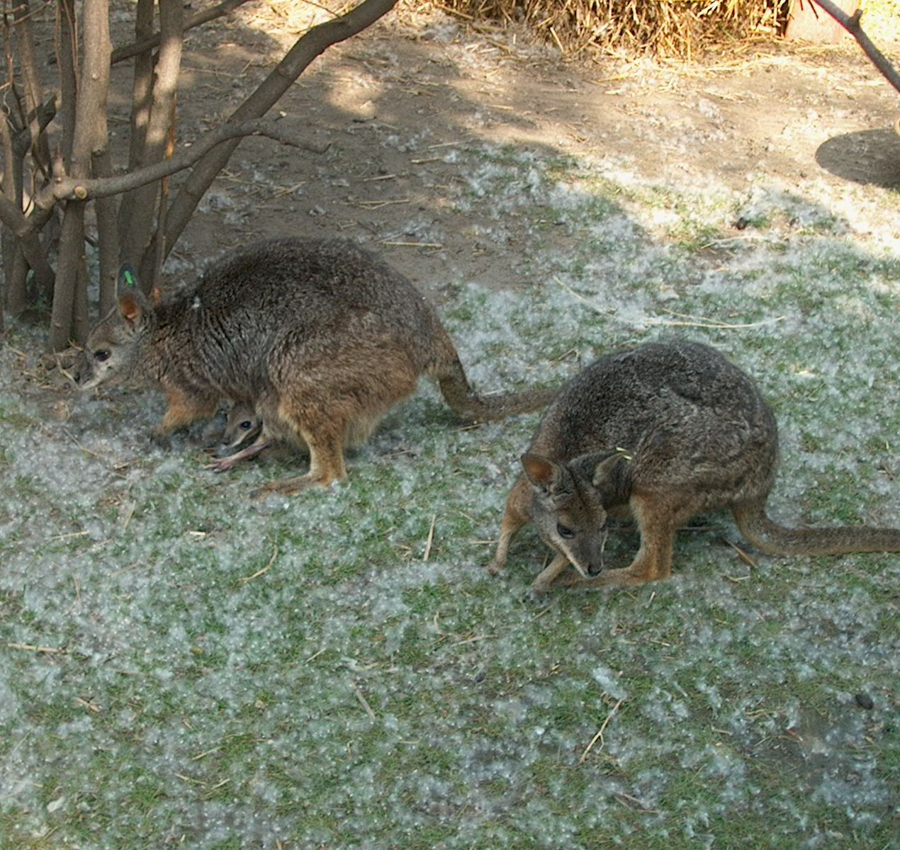 Macropus eugenii in Budapest Zoo